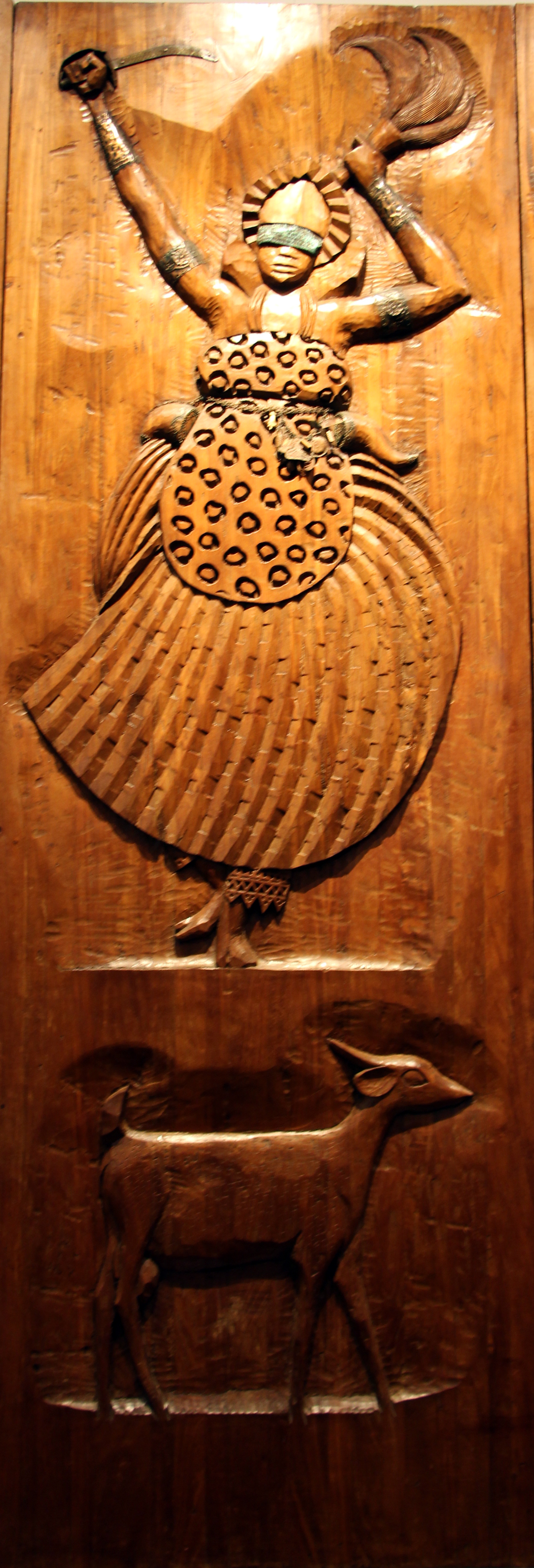 Candomblé nel Museu Afro-Brasileiro, Salvador